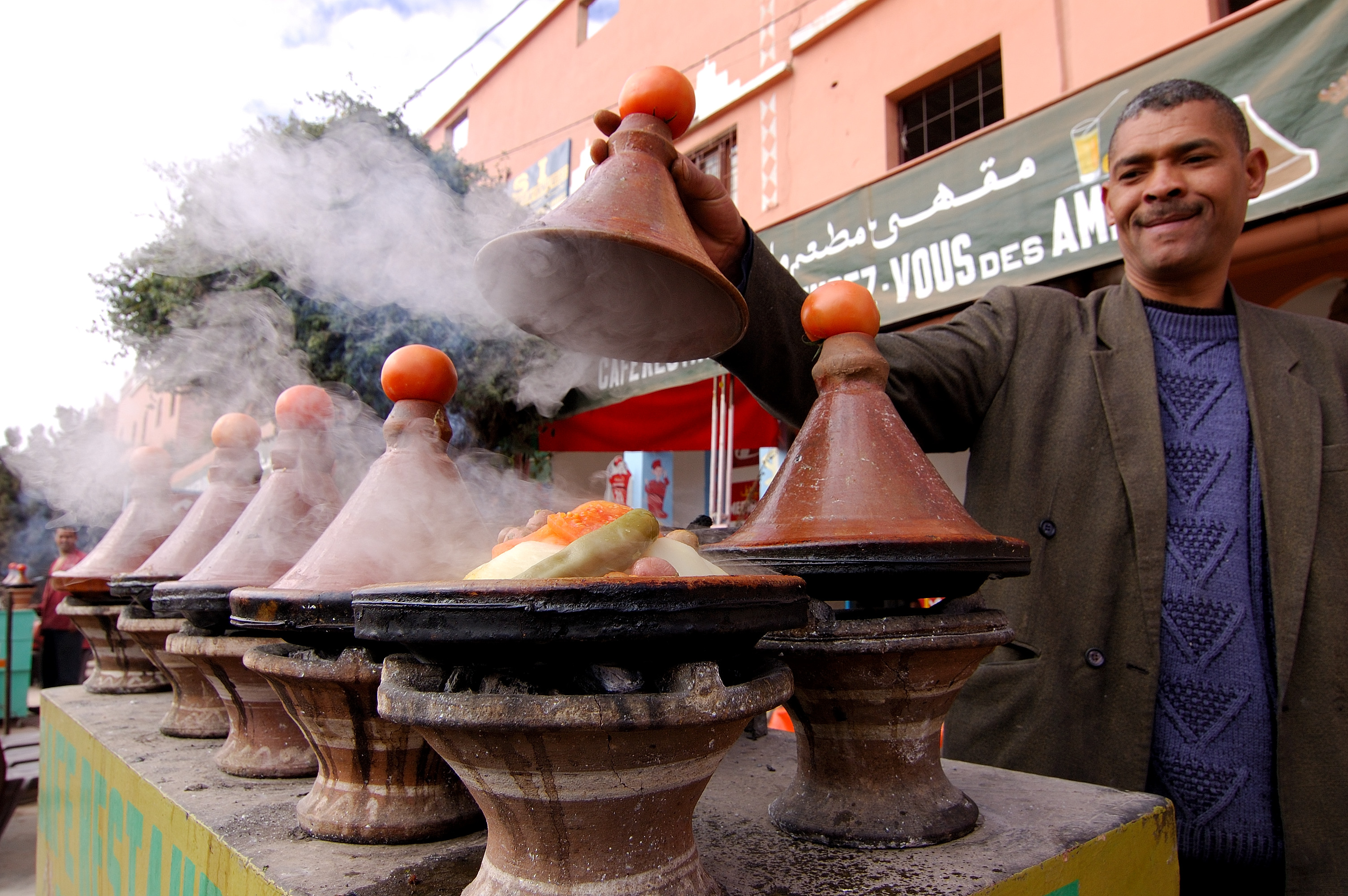 Kelaa-des-Mgouna [2005]